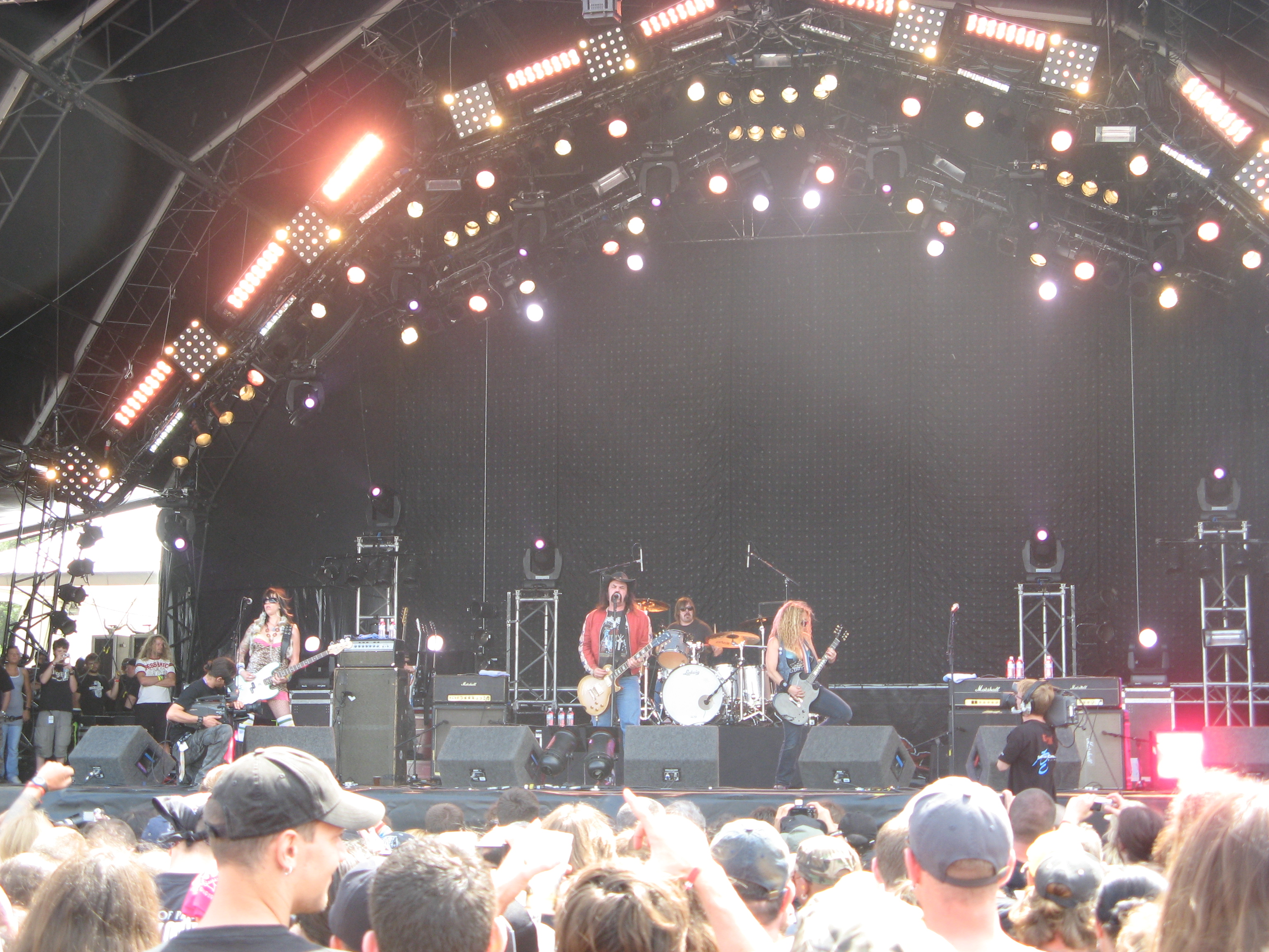 Nashville Pussy performing at Hellfest 2009